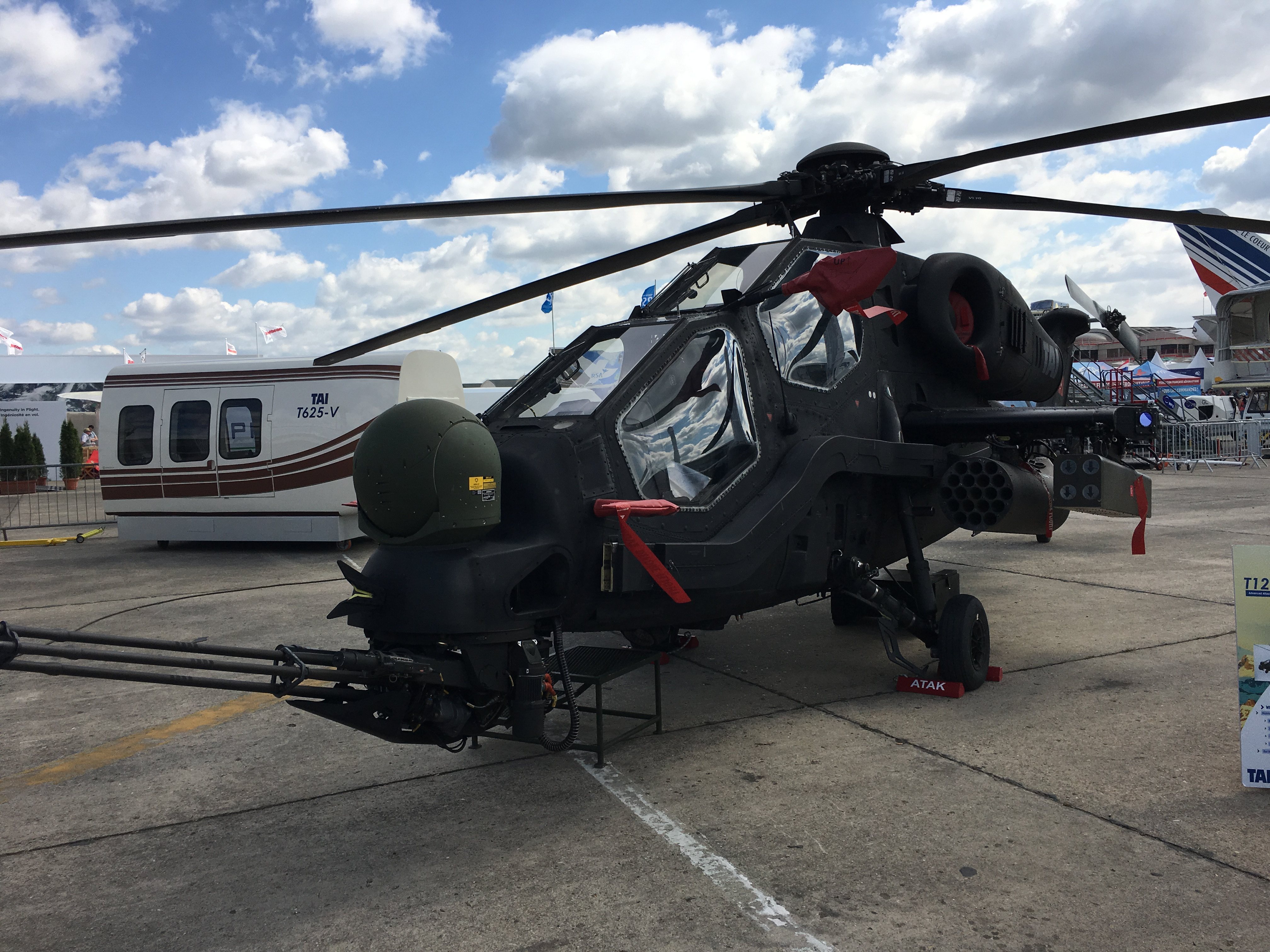 Exposition du T-129 ATAK au Salon international de l'aéronautique et de l'espace de Paris-Le Bourget